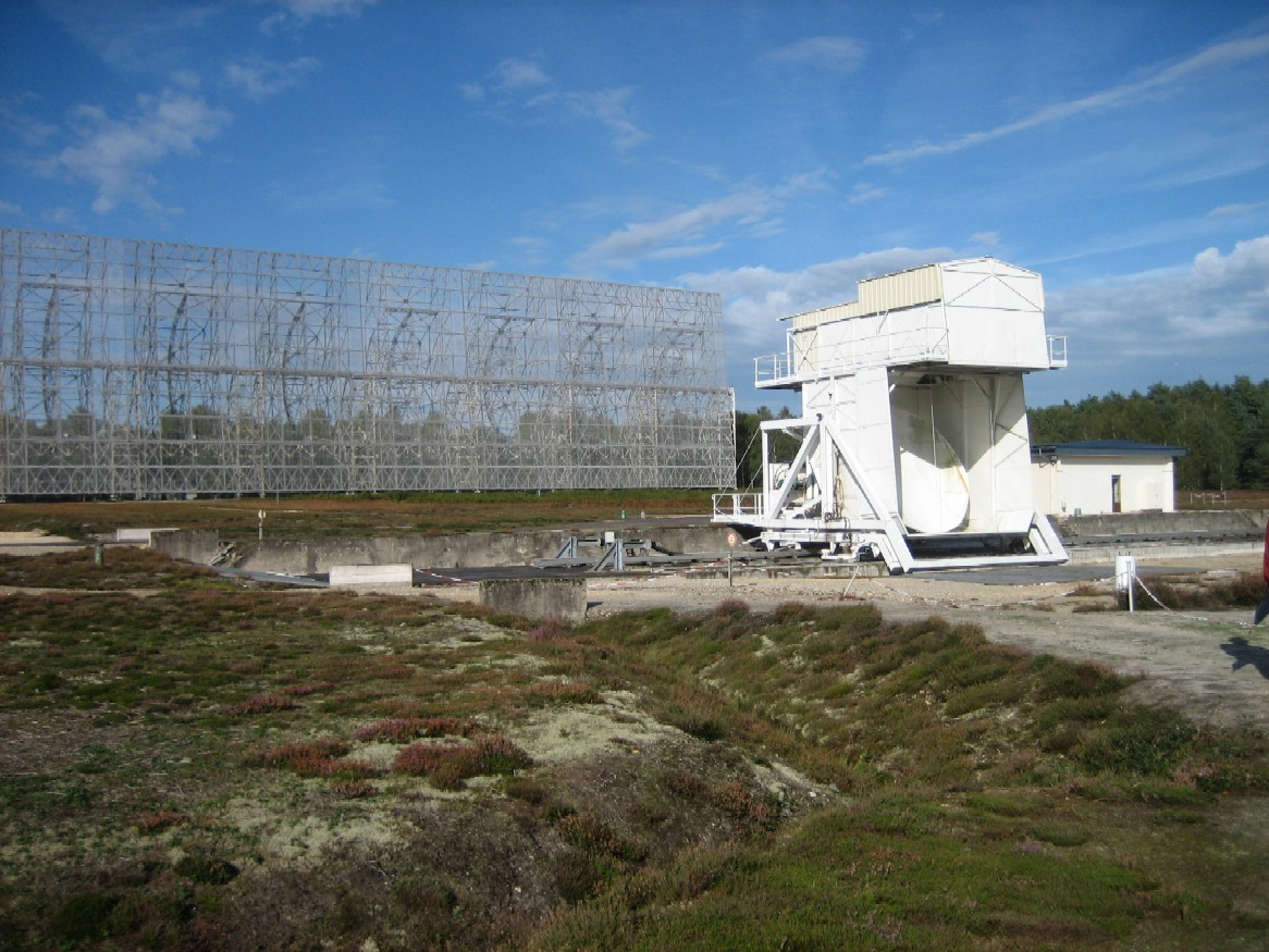 Dans le fond, le miroir plan primaire. à droite, le batiment capteur au foyer sur roulettes